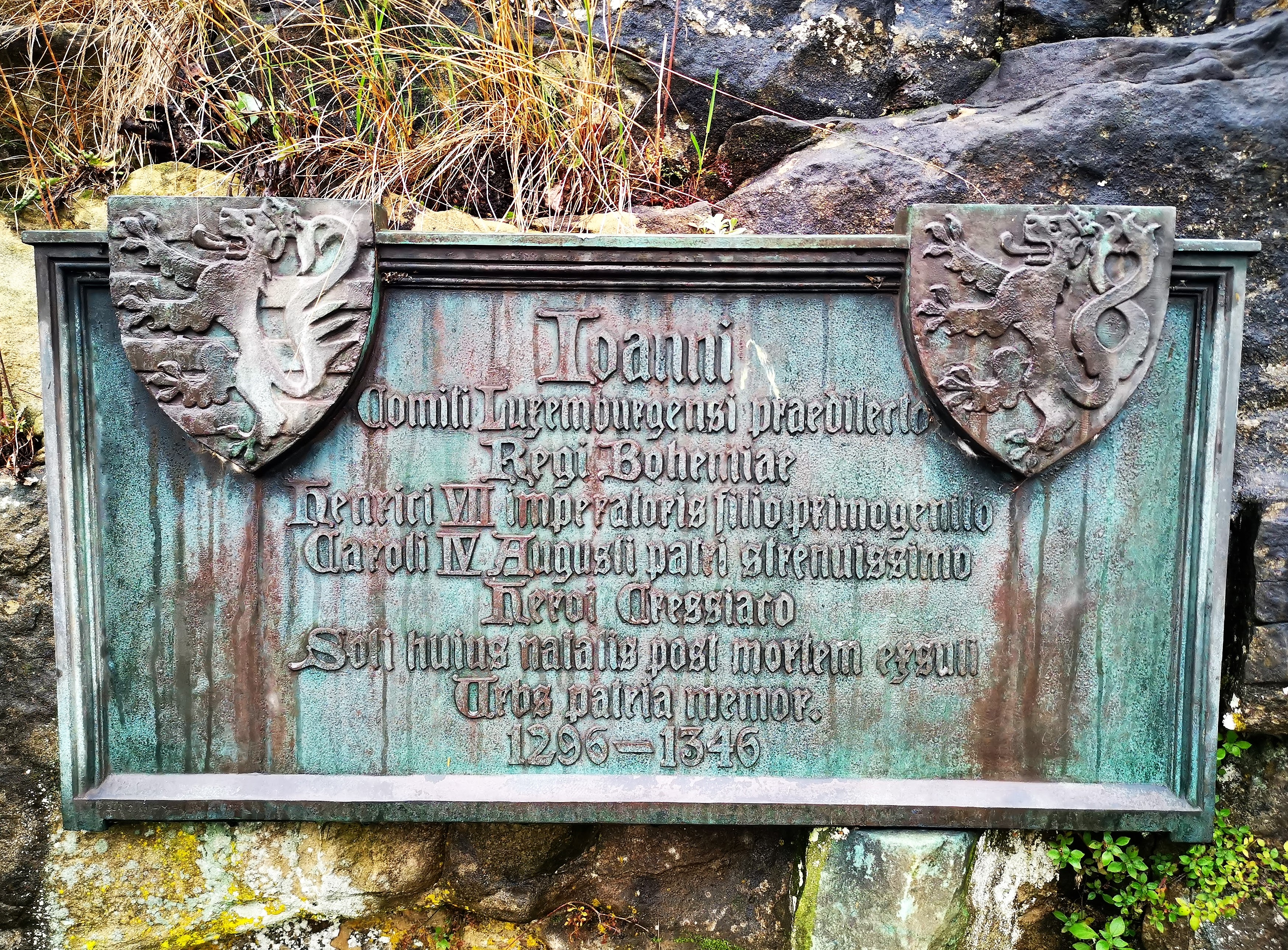 Luxembourg, rocher du Bock. Plaque commémorative en mémoire de Jean de Luxembourg, dit l'Aveugle (1296 – 1346), roi de Bohême, comte de Luxembourg, roi titulaire de Pologne.